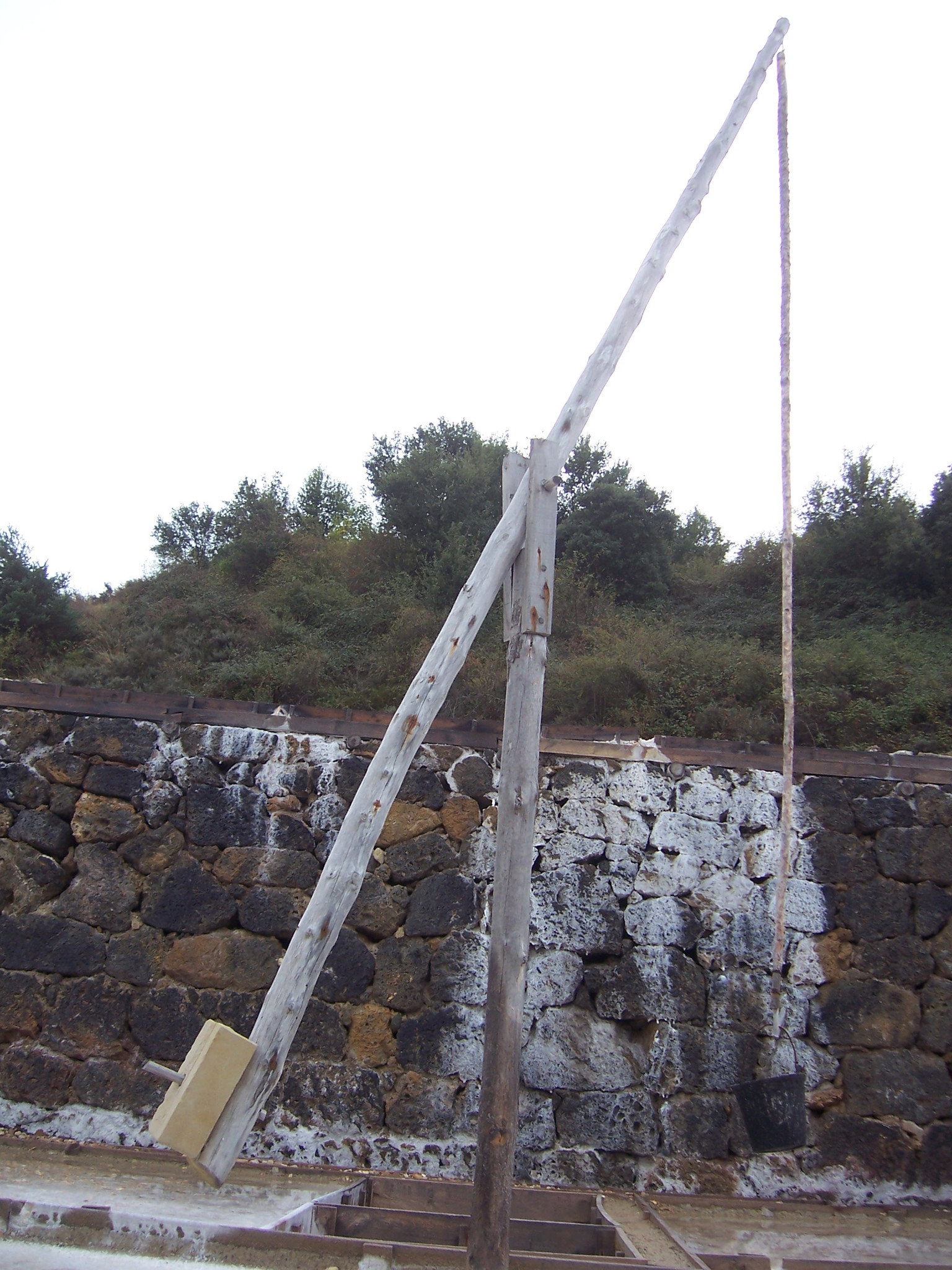 Trabuquete de Salinas de Añana